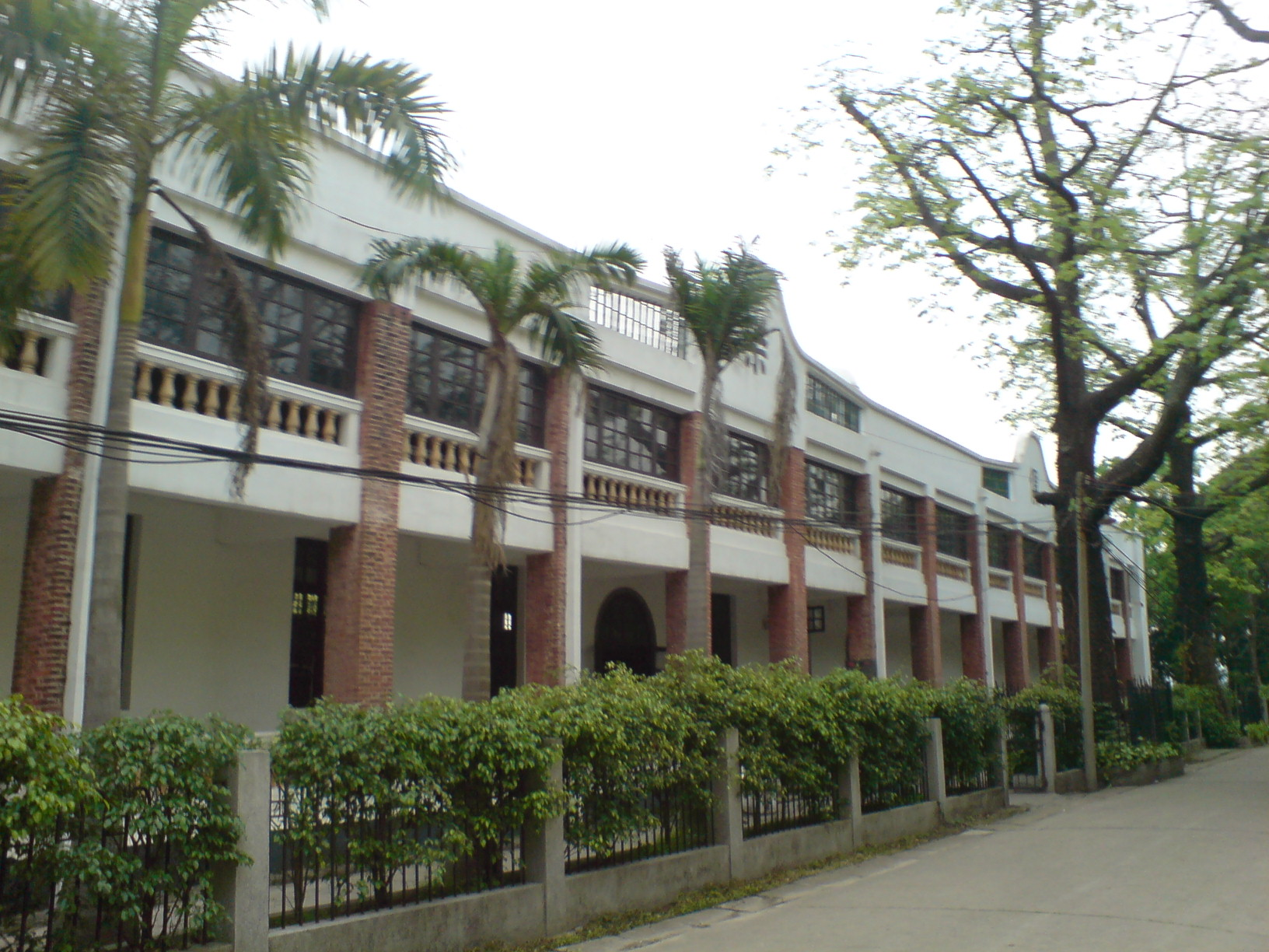 广州黄埔军校俱乐部